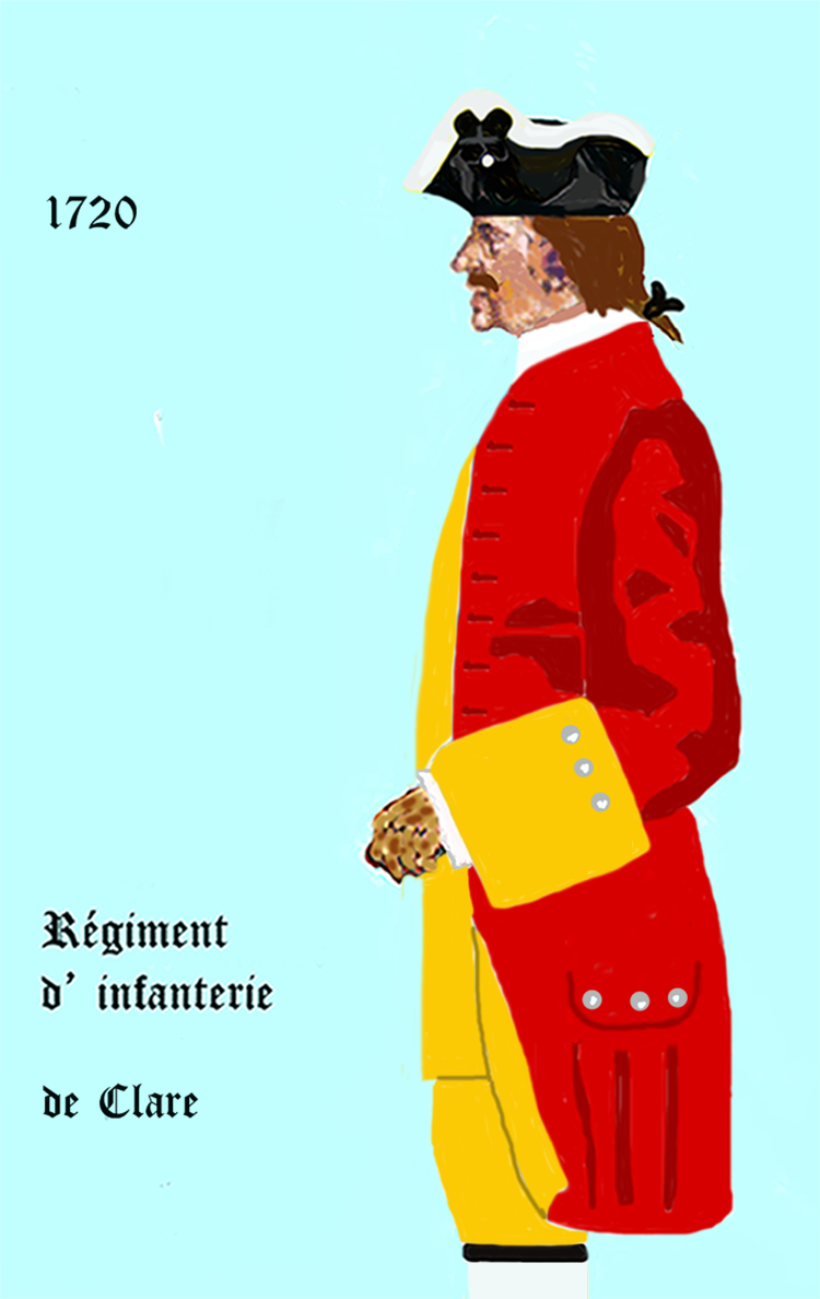 Uniform eines königlich französischen Infanterie-Regiments von 1720. - Entnommen und überarbeitet aus: „LES UNIFORMES ET LES DRAPEAUX DE L'ARMÉE DU ROI“ Marseille 1899.